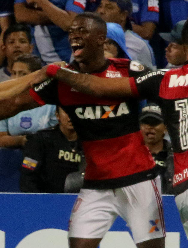 Guayaquil, miércoles 14 de marzo del 2018 (Andes).-En el estadio Capwell en Guayaquil, Emelec enfrenta a Flamengo de Brasil en la segunda fecha del grupo D de la Copa Libertadores. Foto:Andes/César Muñoz